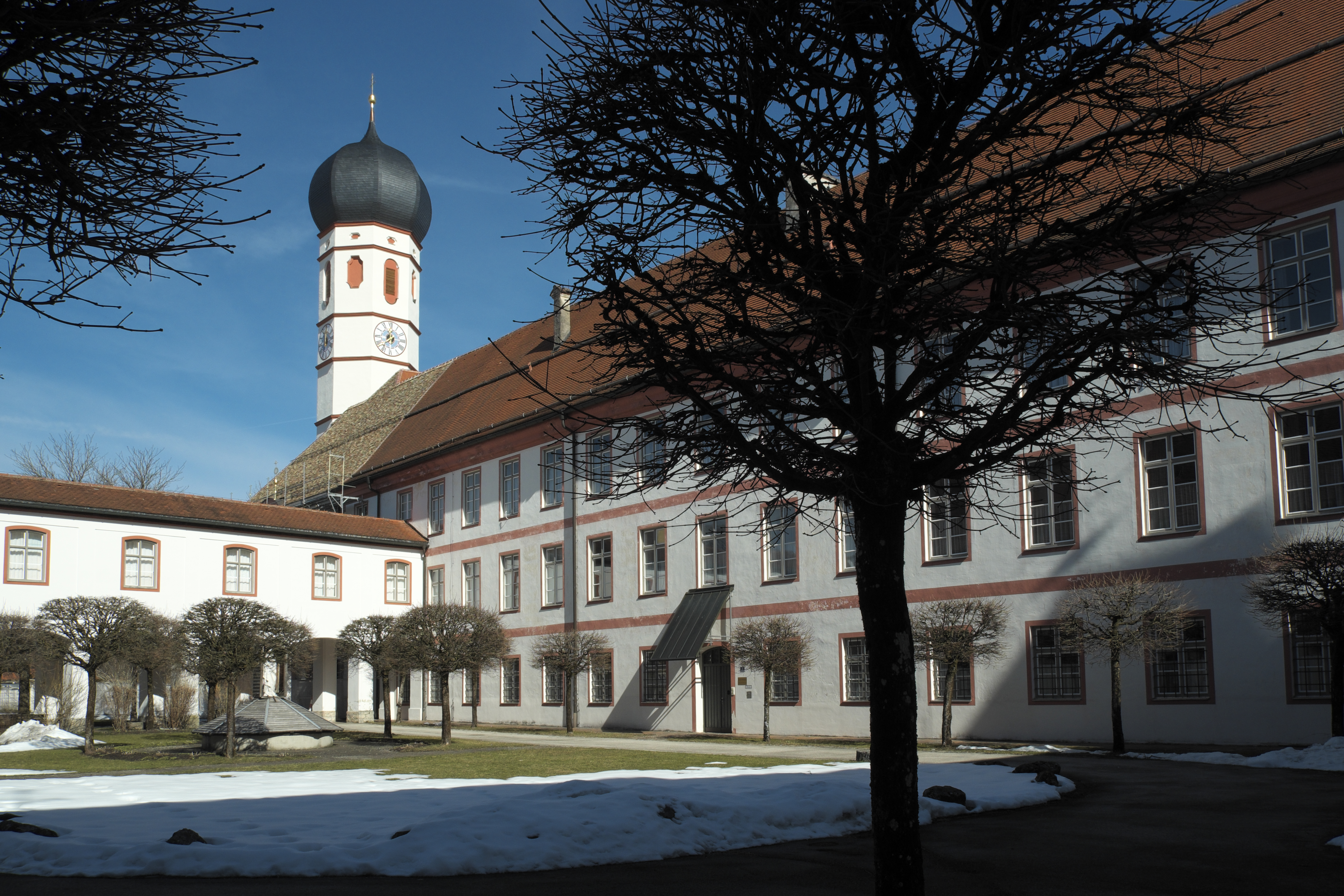 Kloster Beuerberg in Beuerberg, einem Ortsteil von Eurasburg im Landkreis Bad Tölz-Wolfratshausen (Bayern/Deutschland)